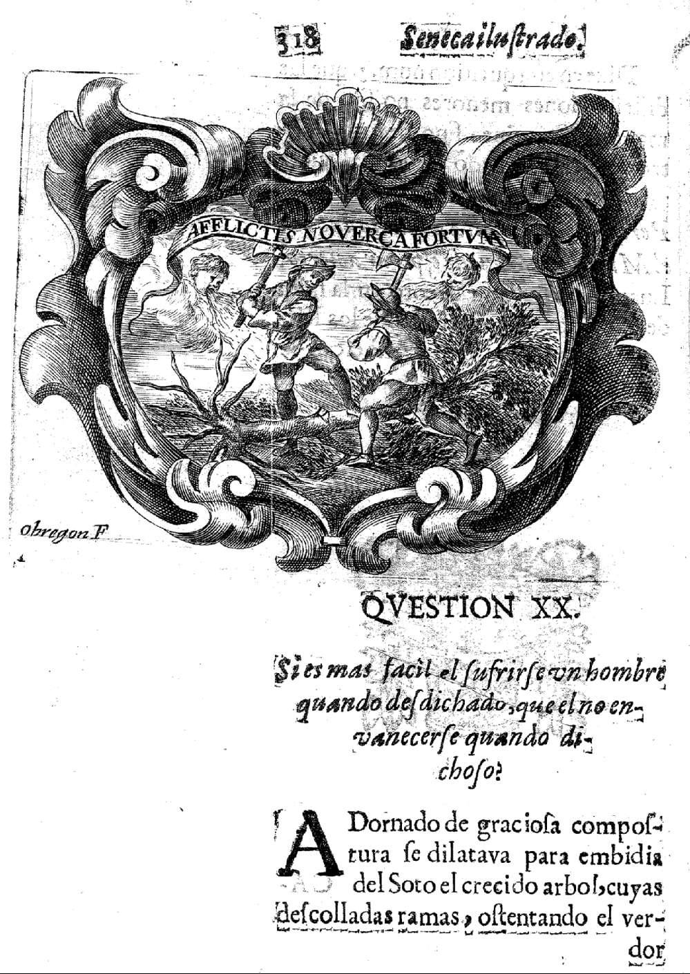 Ilustración de Juan Baños de Velasco, L. Anneo Séneca ilustrado en blasones políticos y morales..., En Madrid, 1670.